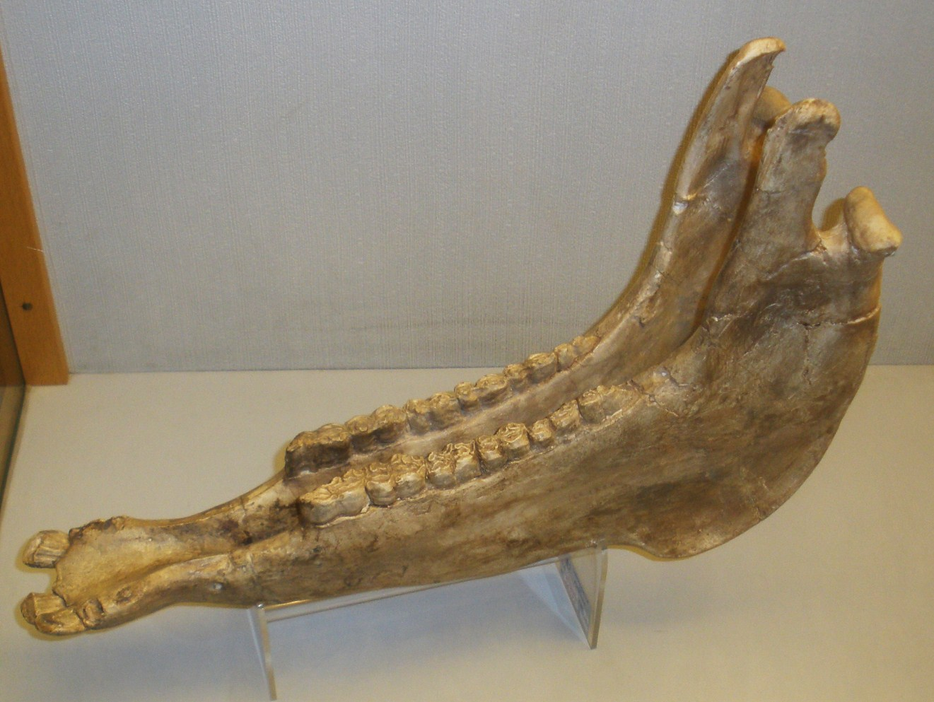 Fossil of Hipparion, an extinct mammal- Took the picture at Museo di Paleontologia di Firenze